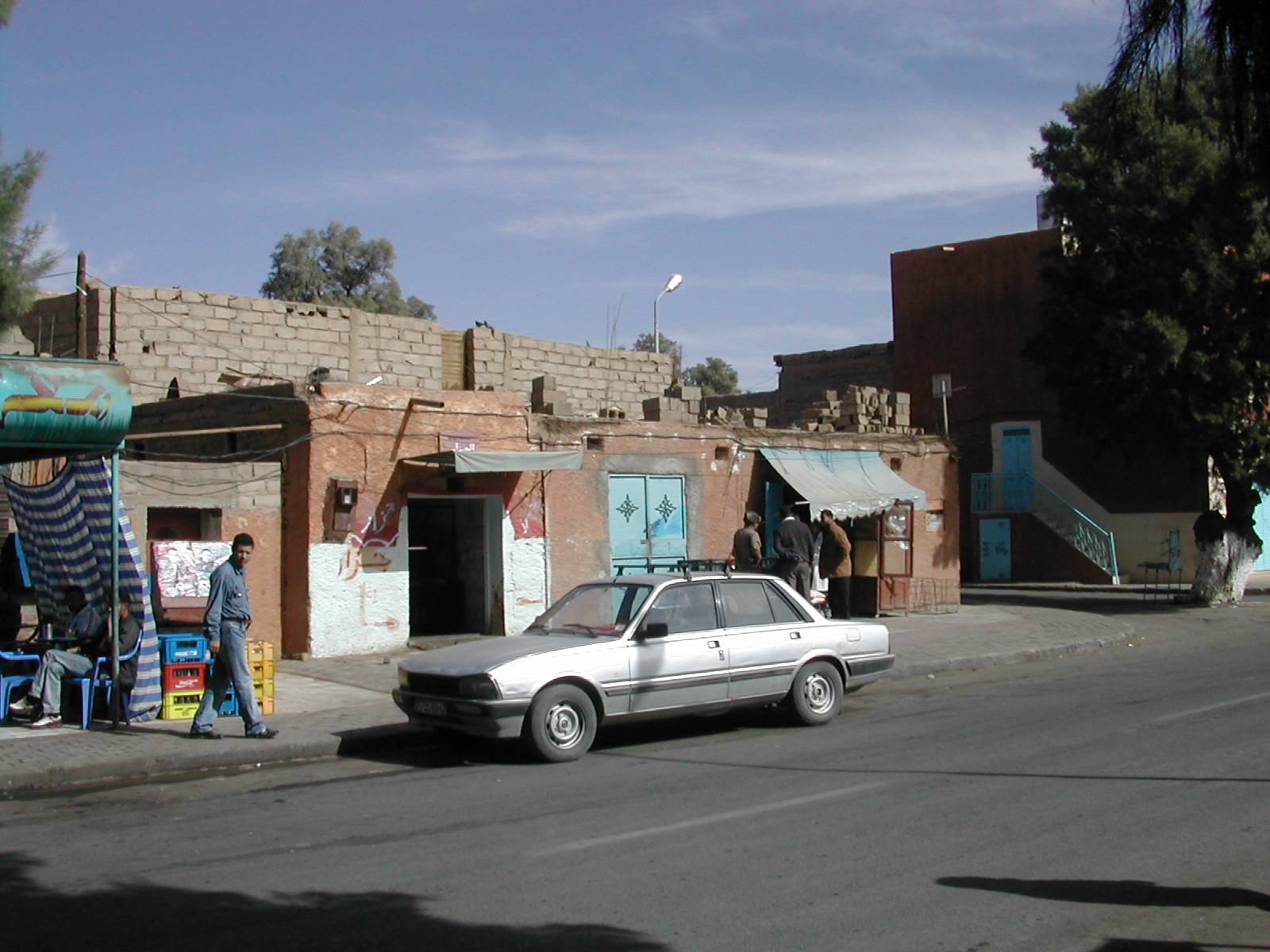 Rue Tamanrasset, Algérie